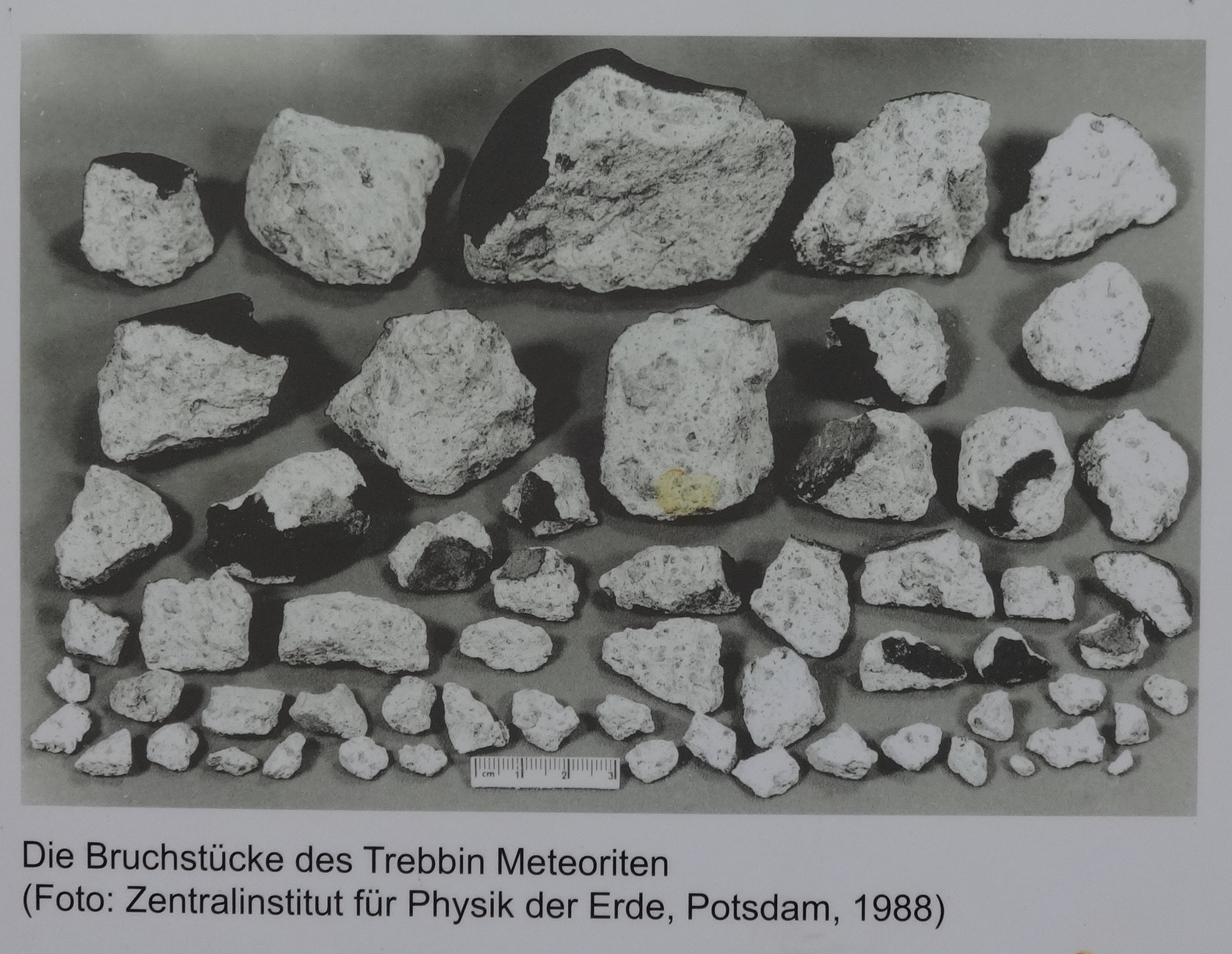 Infotafel über einen Meteoriteneinschlag im Jahr 1998 in Trebbin, Teltow-Fläming, Brandenburg Die Tafel ist öffentlich zugänglich und befindet sich in der Bahnhofstraße der Stadt.